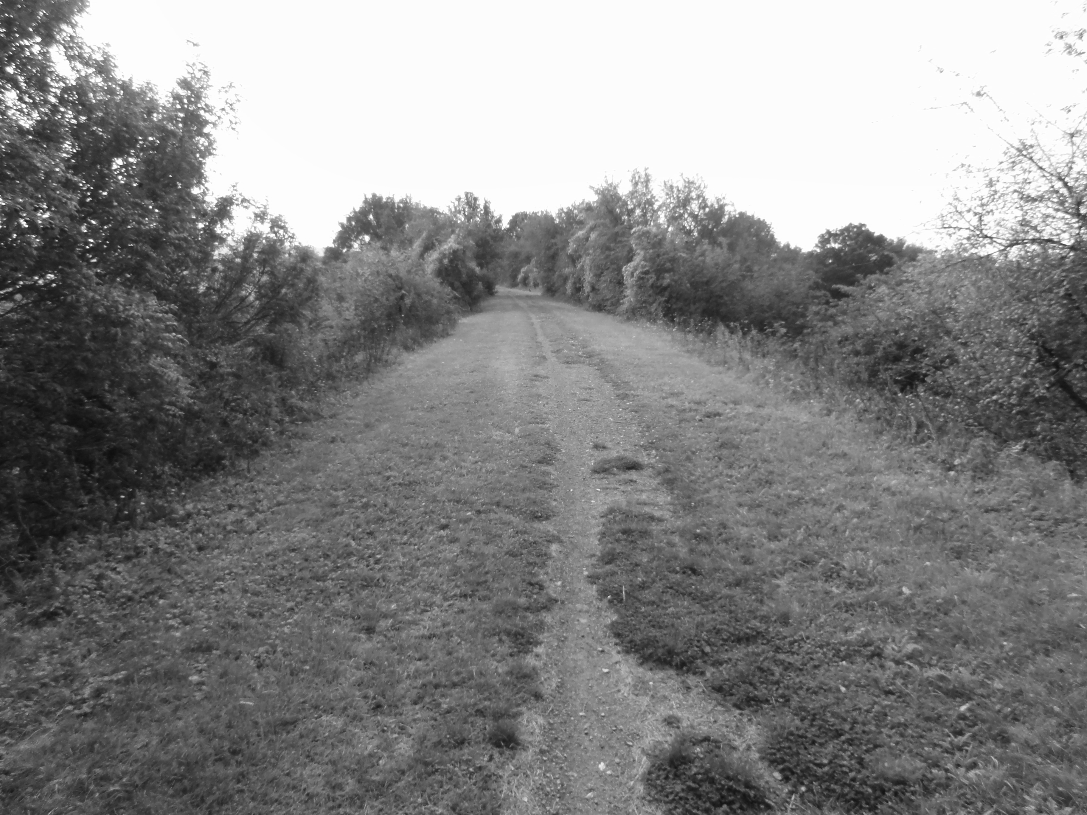 Terril n° 249 dit Cavalier du quai de vente, fosse n° 3 de la Compagnie des mines de Béthune dans le bassin minier du Nord-Pas-de-Calais, Noyelles-lès-Vermelles et Mazingarbe, Pas-de-Calais, Nord-Pas-de-Calais, France.